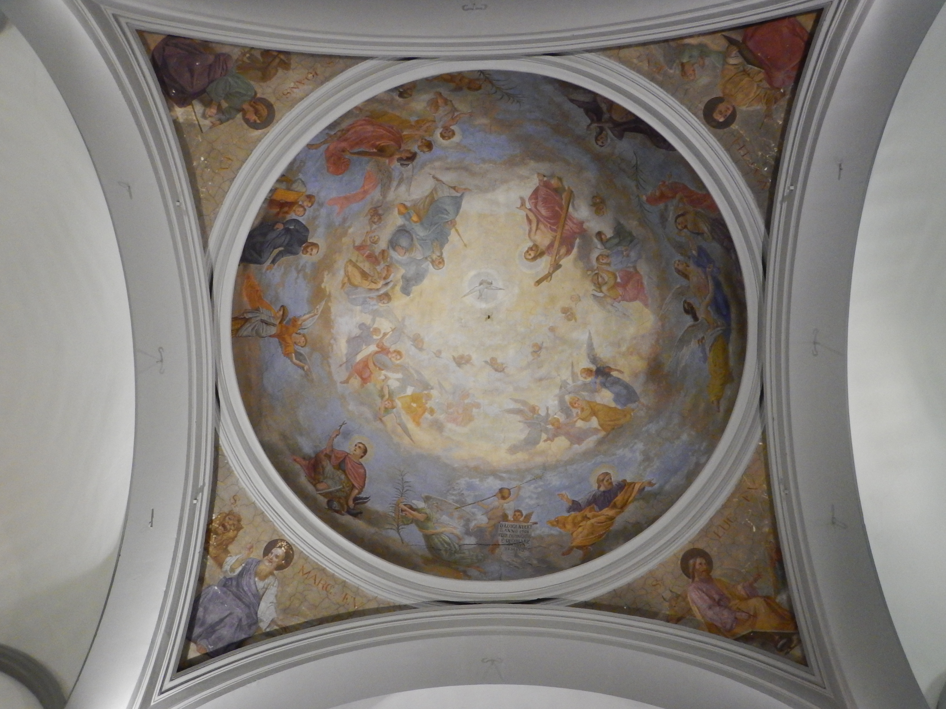 Cupola della Chiesa di San Quirico a Legnaia, nella quale è rappresentata la Santissima Trinità in Gloria